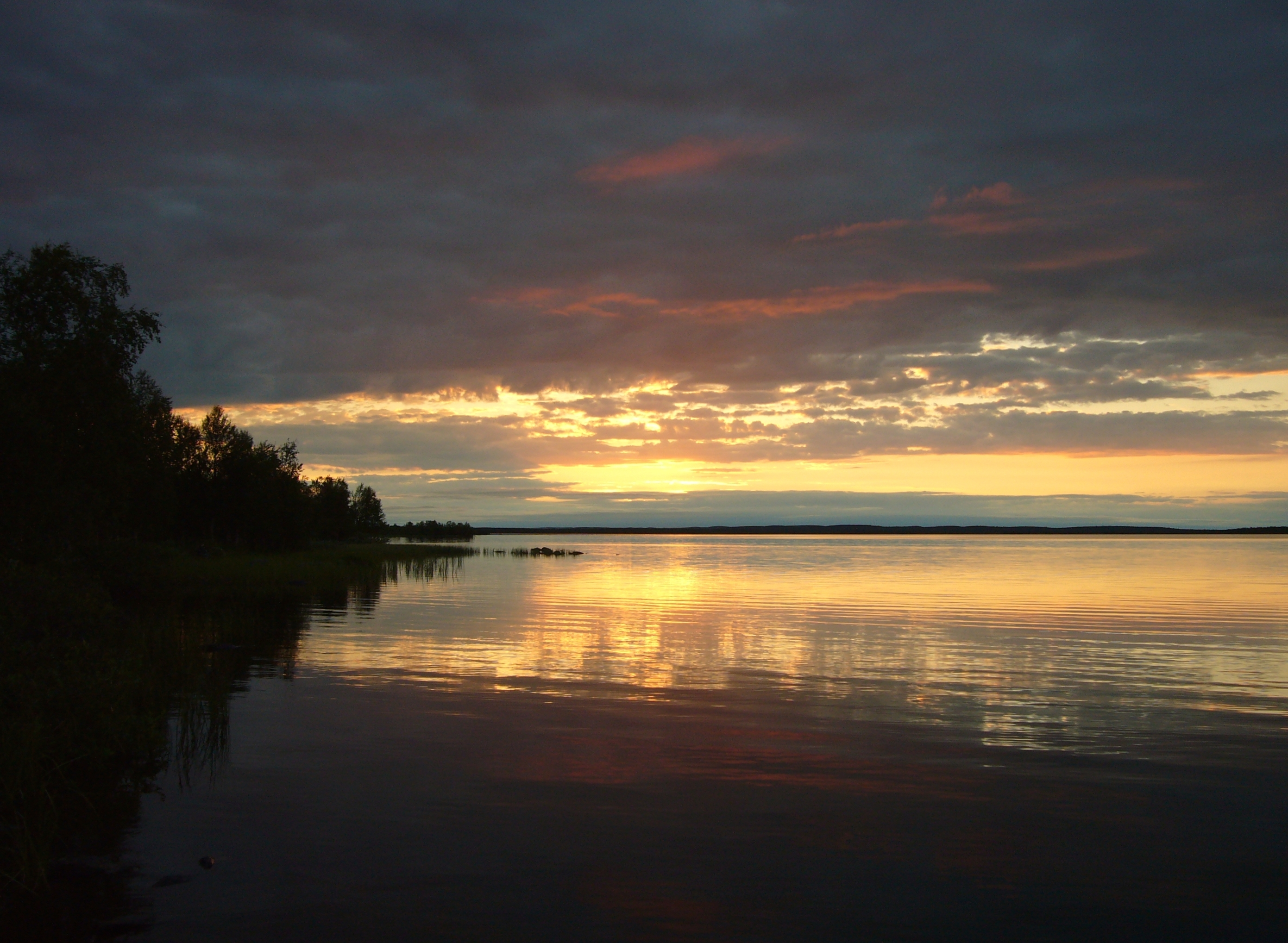 Syysjärvi